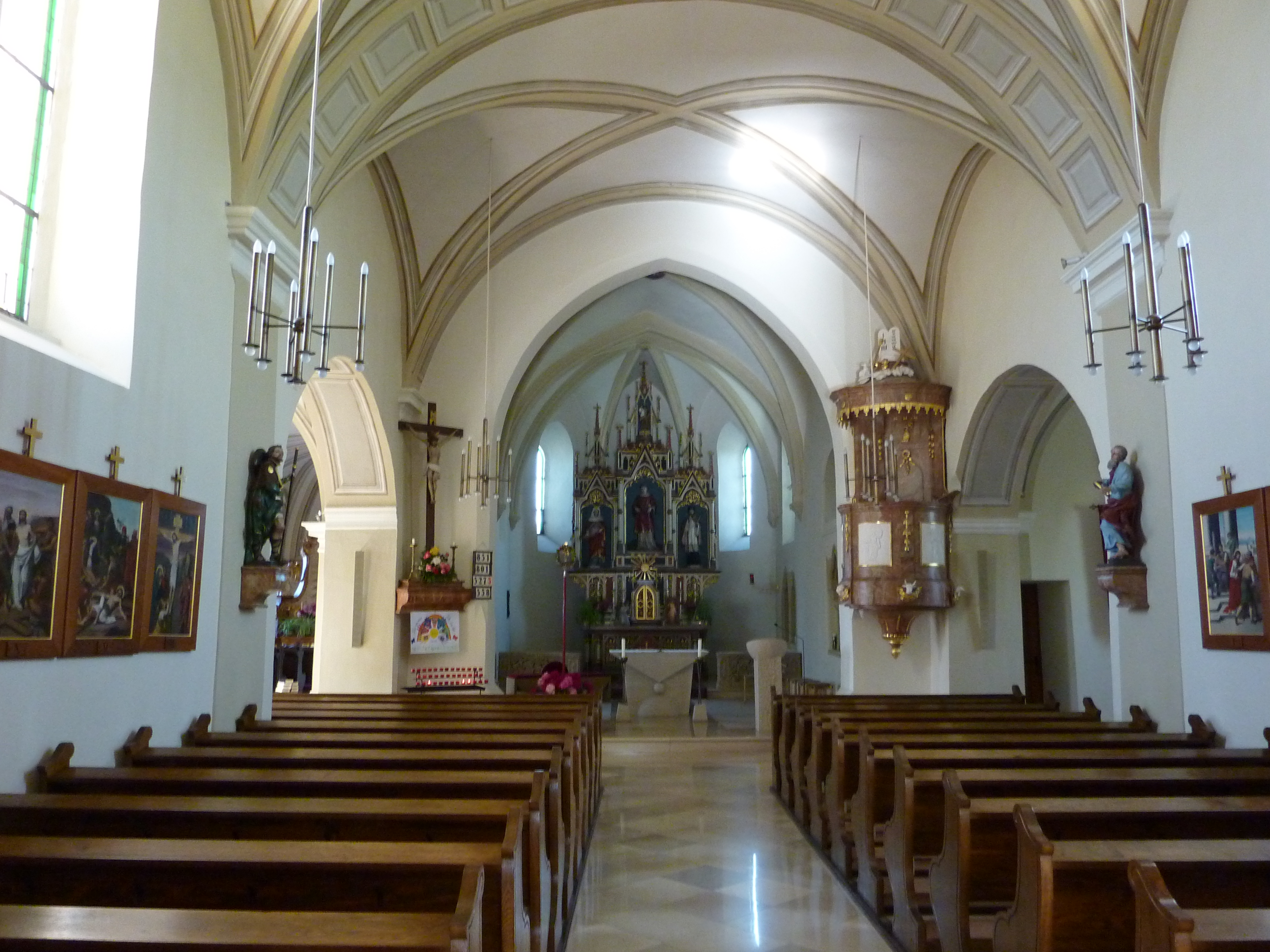 Pfarrkirche hl. Stephanus, Nappersdorf, Nappersdorf-Kammerdorf, Niederösterreich